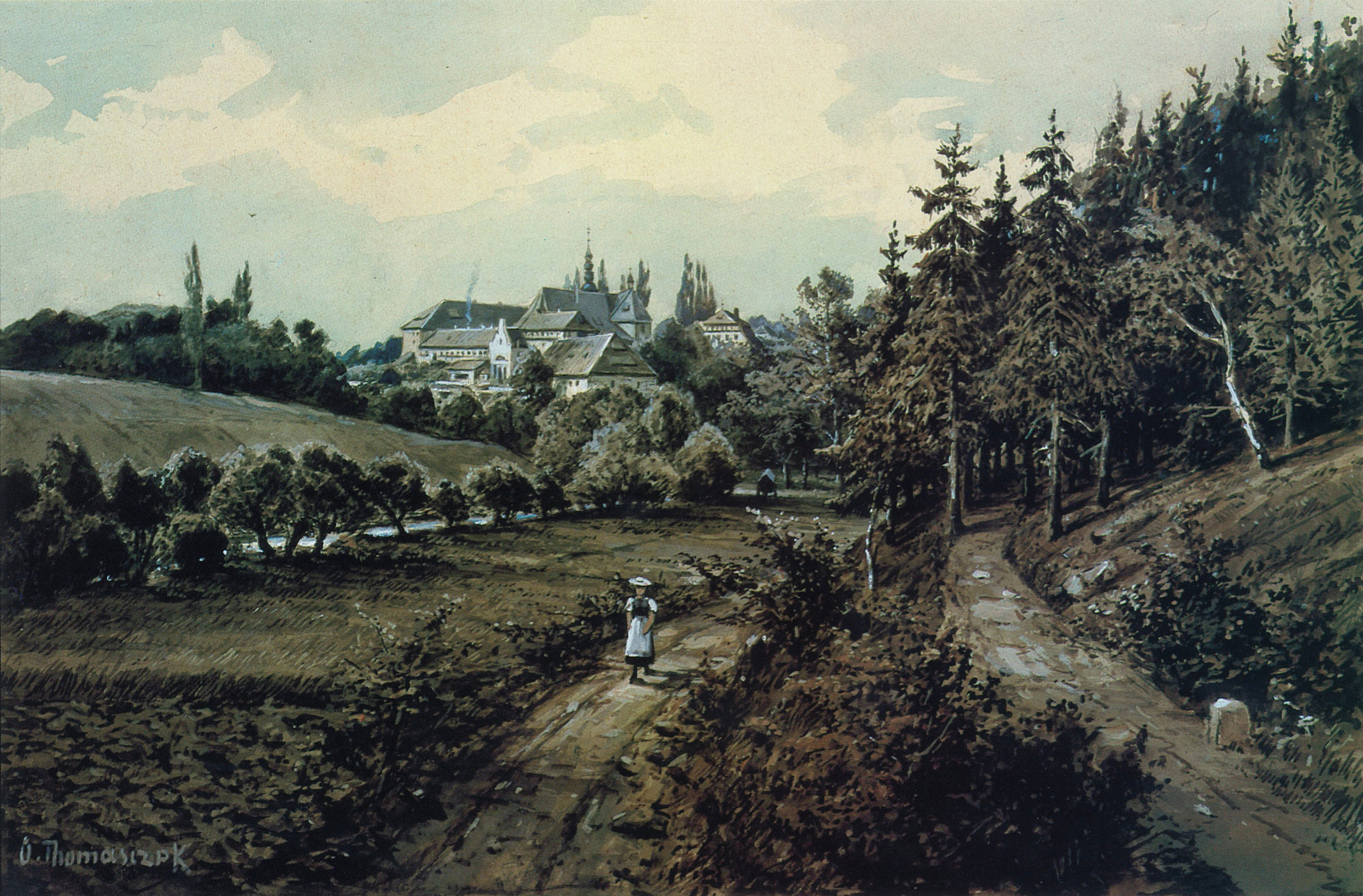 Gemälde von Otto Tomasczek vom Kloster Anrode. Wahrscheinlich aus den 1910er Jahren.